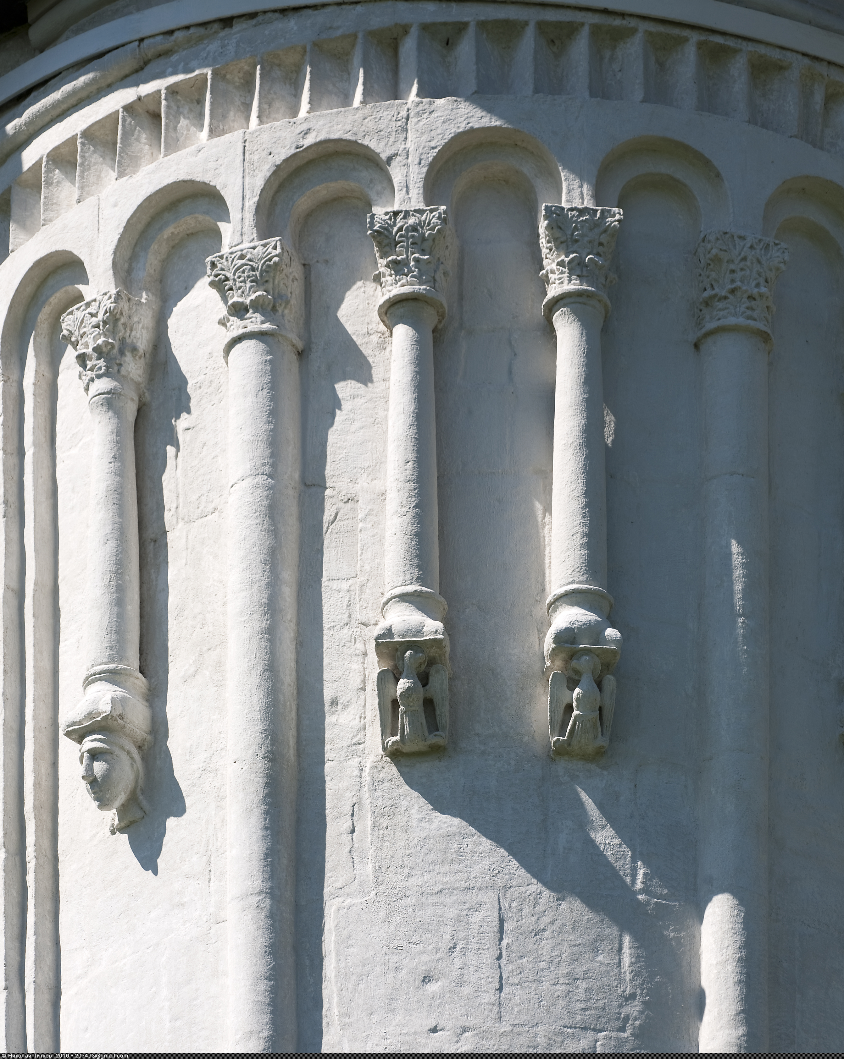 Покров на Нерли — четырёхстолпный, трёхапсидный, одноглавый храм, построенный из белого камня высочайшего качества (кладка весьма однородна, в ней практически отсутствует желтоватый оттенок, пористость блоков очень низка). В сводах для их облегчения применён туфообразный известняк. Храм стоит на уникальном фундаменте, состоящем из восьми рядов качественного гладкотёсаного белого камня (в целом около 4 метров глубиной), базирующихся на обычной для суздальского зодчества бутовой основе, почти квадратной в разрезе (глубиной около 2 метров). Дата постройки — 1165 год — оспаривается многими исследователями.